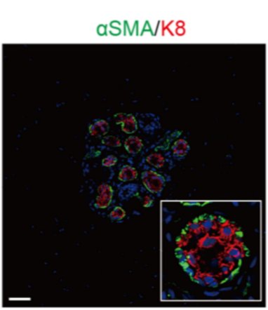 Figura 1. Perfiles Moleculares de compartimentos de glándula sudorípara humana. (D) Detección por inmunofluorescencia doble de marcadores de los compartimentos de glándulas sudoríparas con K8 y αSMA. K8, es un marcador de células secretoras luminales se expresó en las capas luminales. αSMA, es un marcador de células mioepiteliales, se expresó en pequeñas células aplanadas que rodean la capa epitelial secretoria. En verde: compartimento de células mioepiteliales. En rojo: compartimento epitelial secretorio. En azul: núcleos.